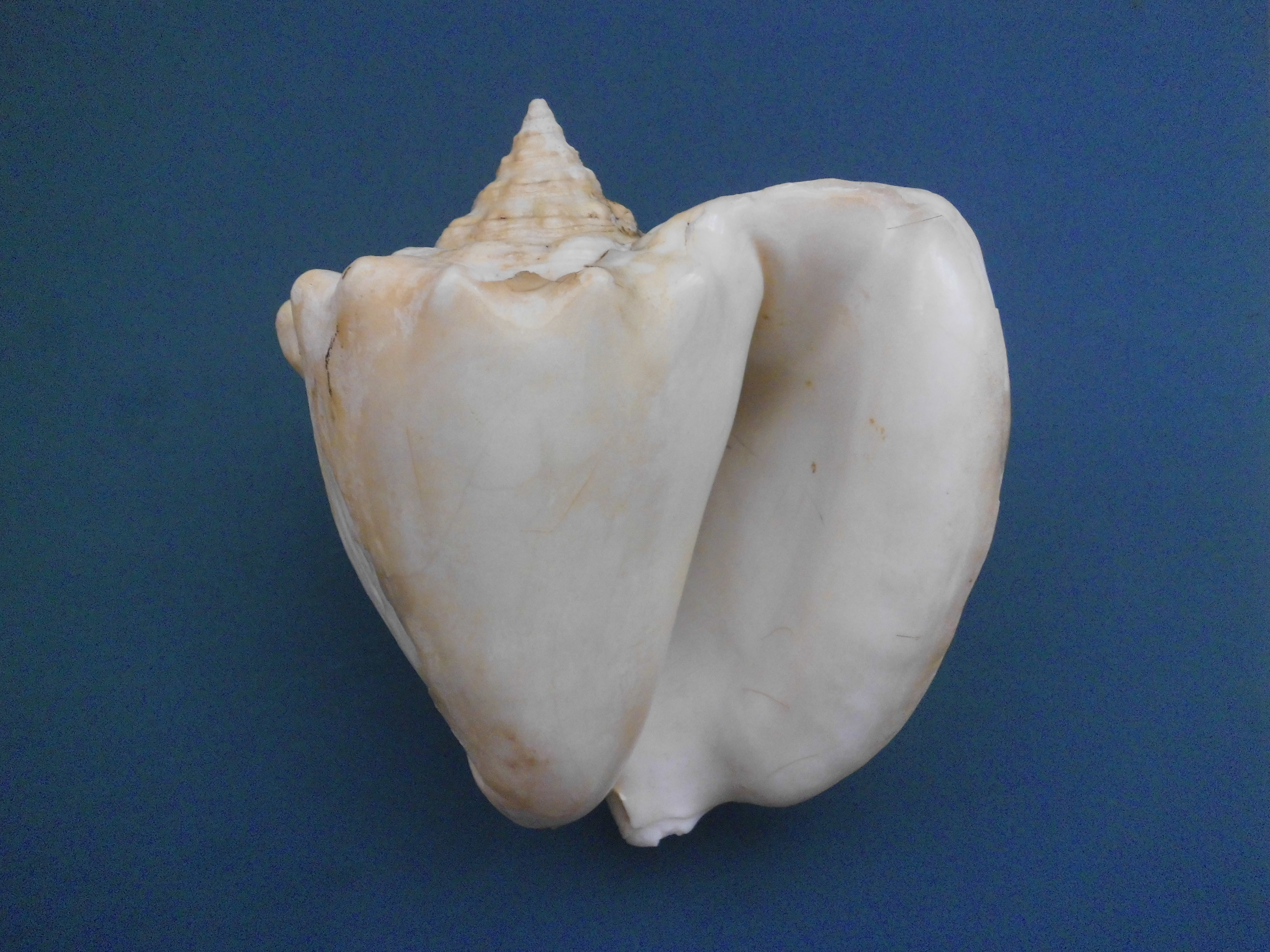 Lobatus costatus (Gmelin, 1791) colectado en el 2003 en Cayos las Tortuguillas - Isla La Tortuga, Dependencia Federales - Venezuela